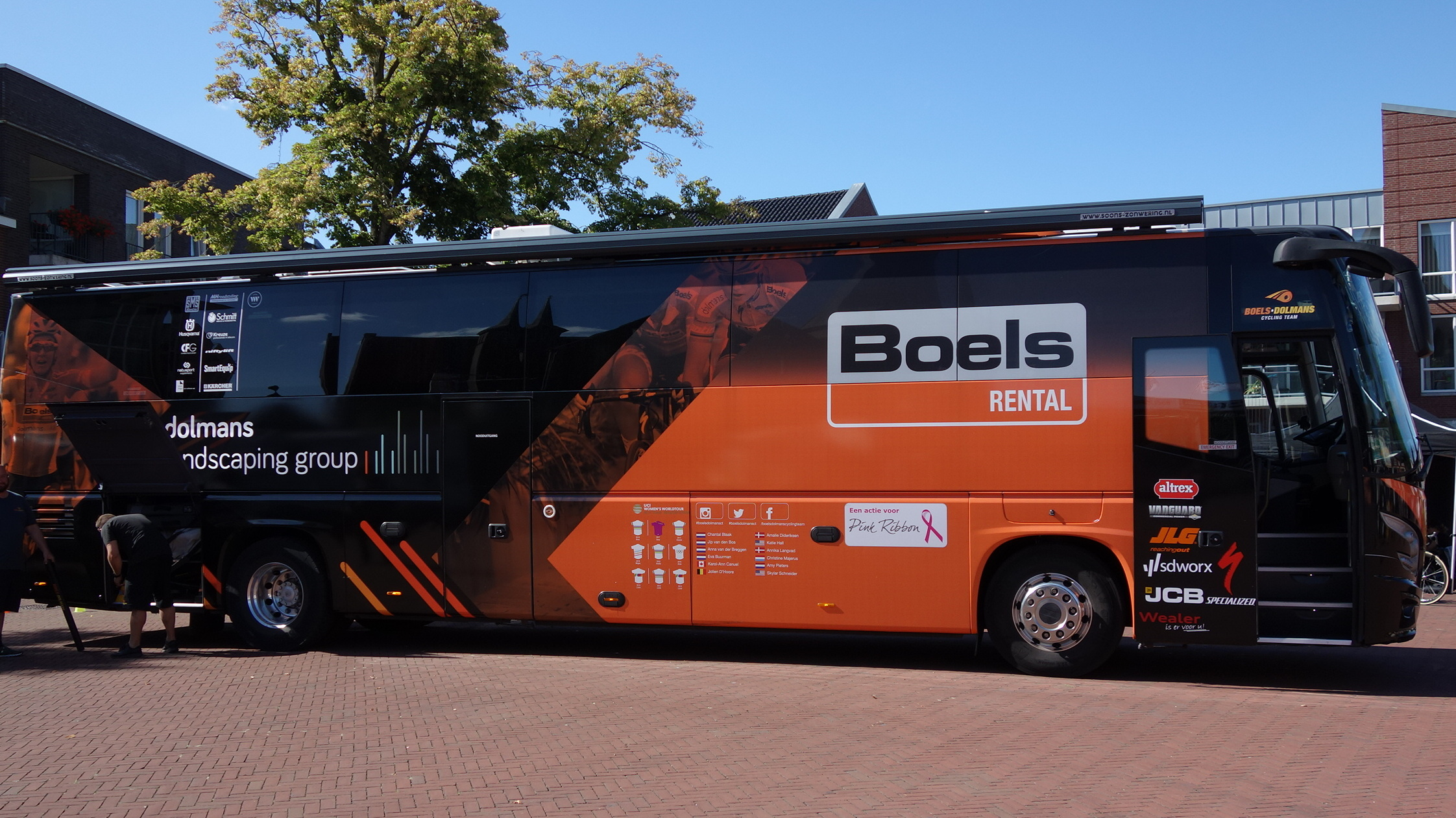 Bus van Boels Dolmans bij de start van de eerste etappe van Stramproy naar Weert in de Boels Ladies Tour 2019